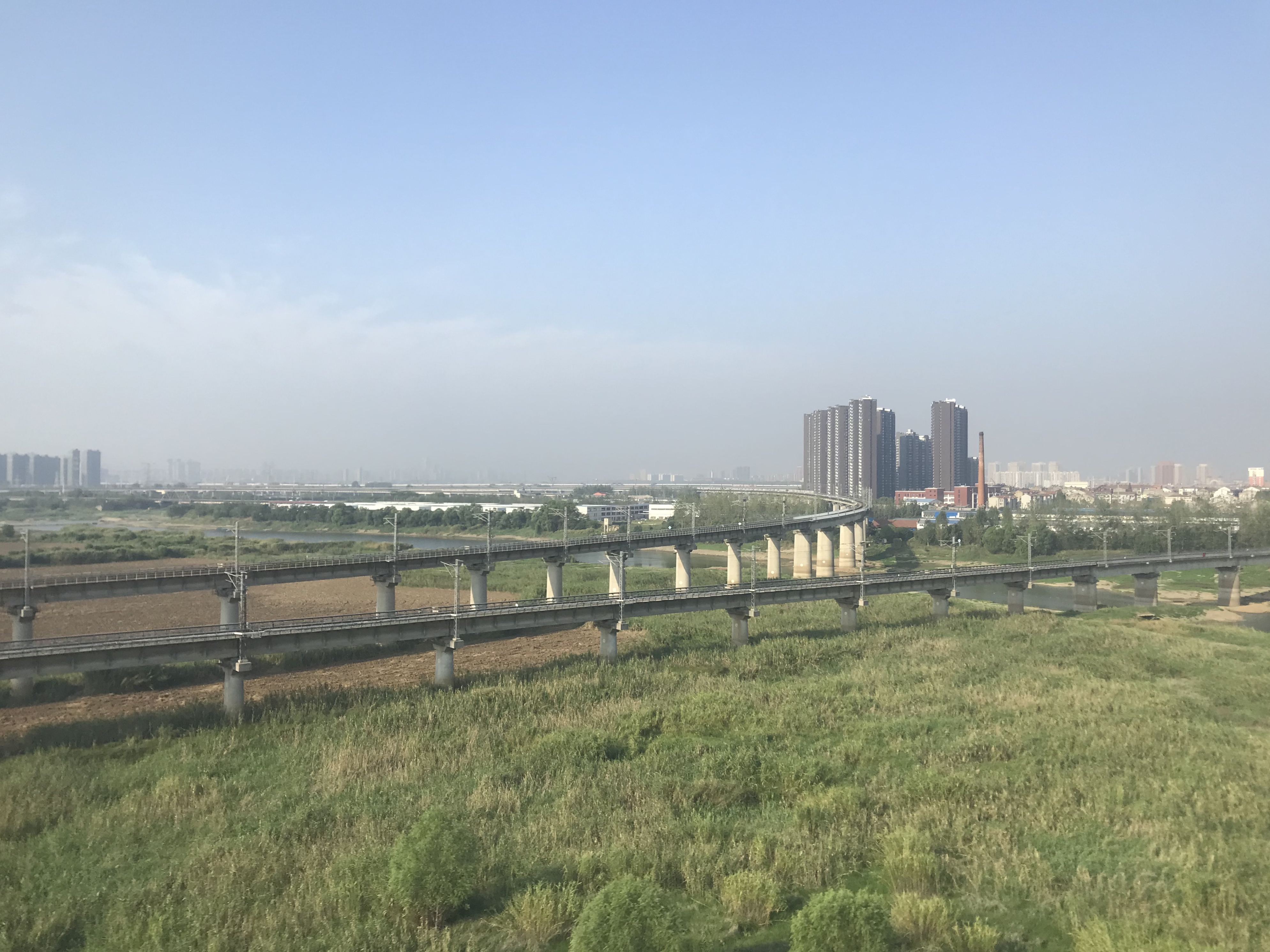 合武線の列車内より望む武漢市黄陂区灄口街道付近の景色